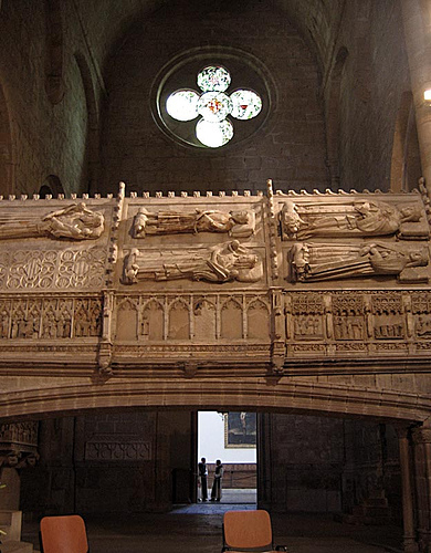 Panteó reial de Poblet: tombes d'Alfons el Cast, Joan I i Joan II